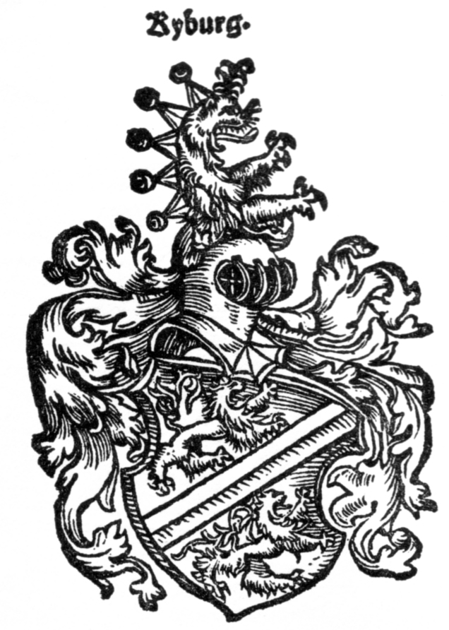 Wappen des Adelsgeschlechts der Kyburger, Holzschnitt aus der Stumpfschen Chronik 1548